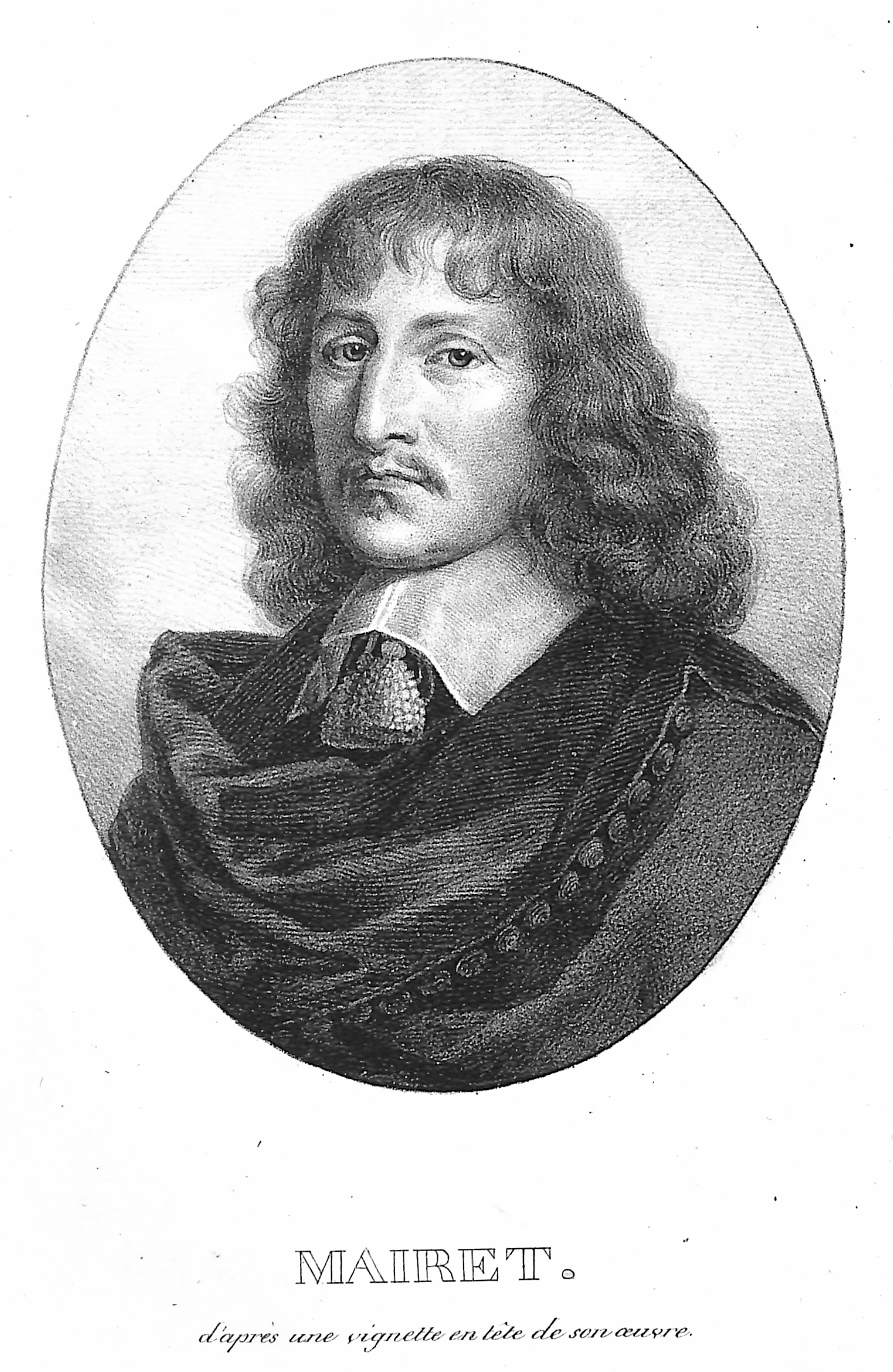 Portrait de Jean de Mairet